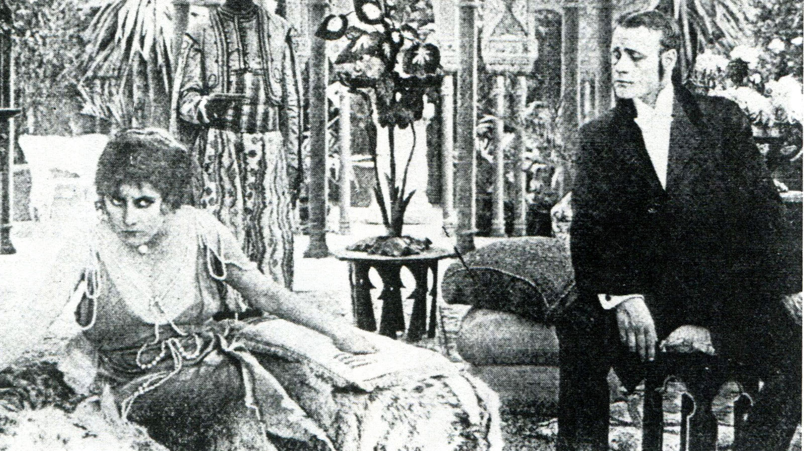 Foto di scena del film un'immagine e due anime con Stacia Napierkowska ed Ettore Berti - regia non accertata - produz 1915 Film d'Arte italiana - Roma